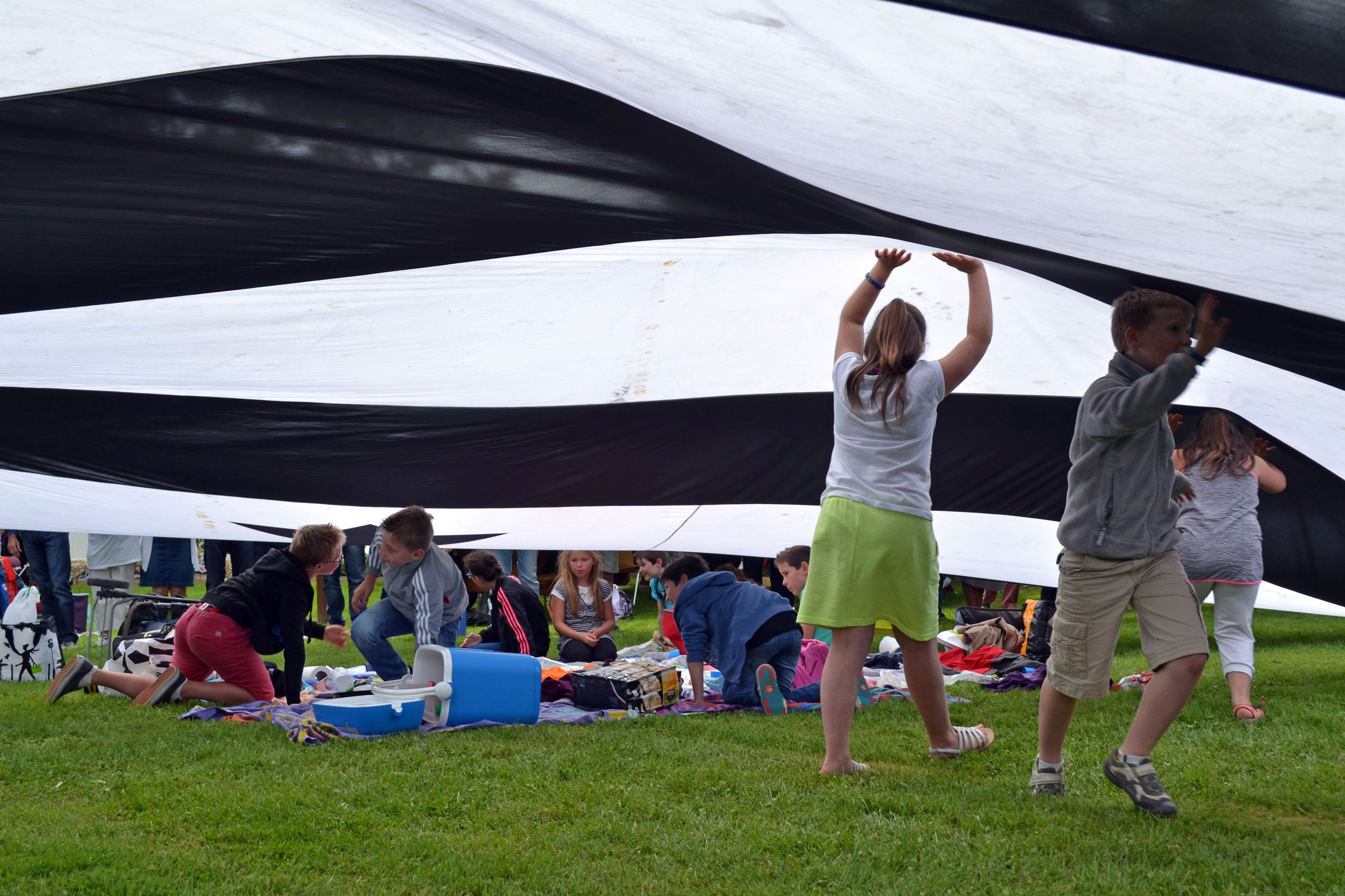 Garden Pâté : rassemblement festif avec un pique-nique dans le jardin de la maison du Pâté Hénaff le dimanche 24 août 2014.